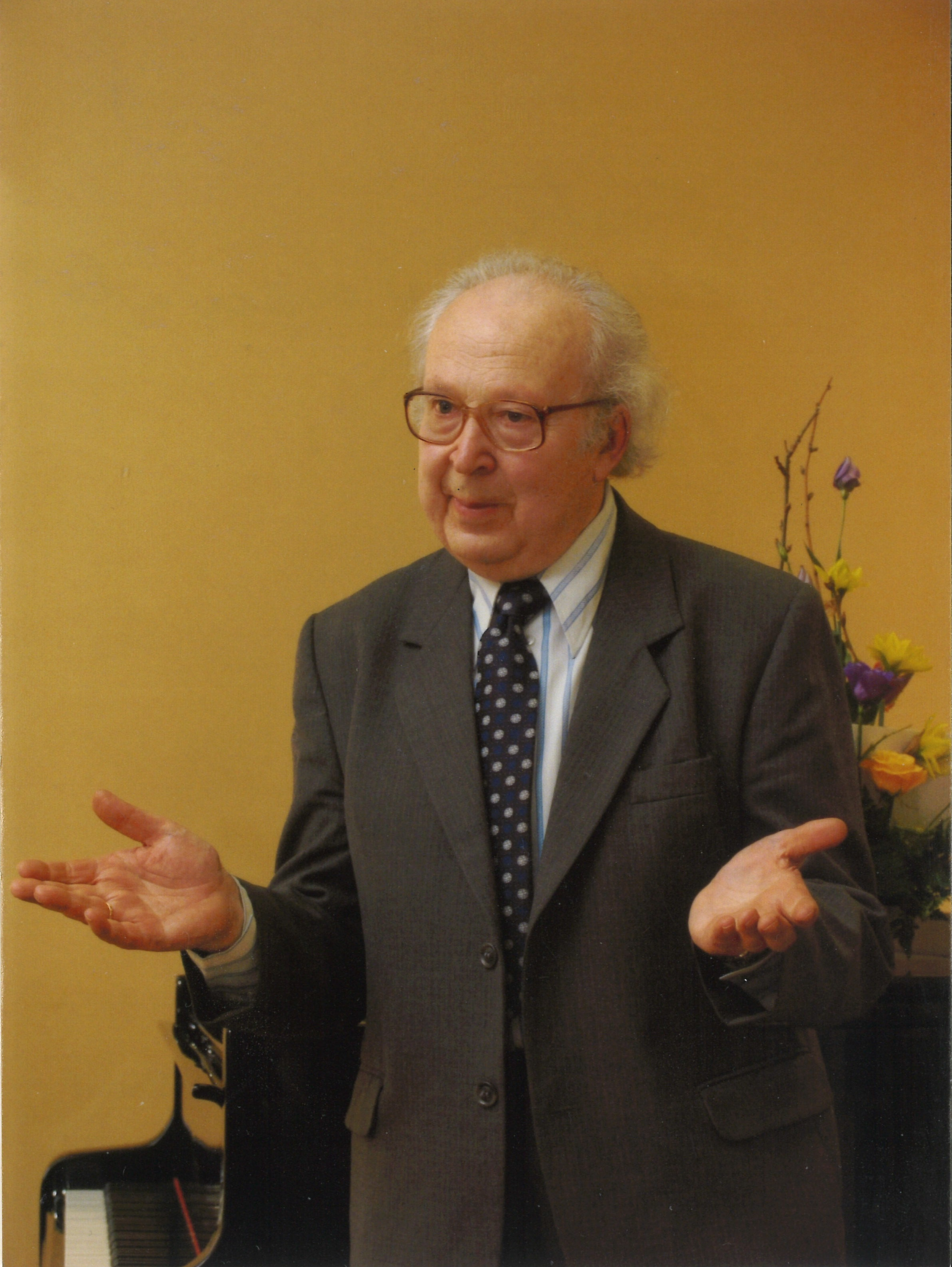 Kalju Lillepuu 70. aasta juubel Viljandi Kultuuriakadeemias 29. märtsil 2005 a. K. Lillepuu esineb tänukõnega.